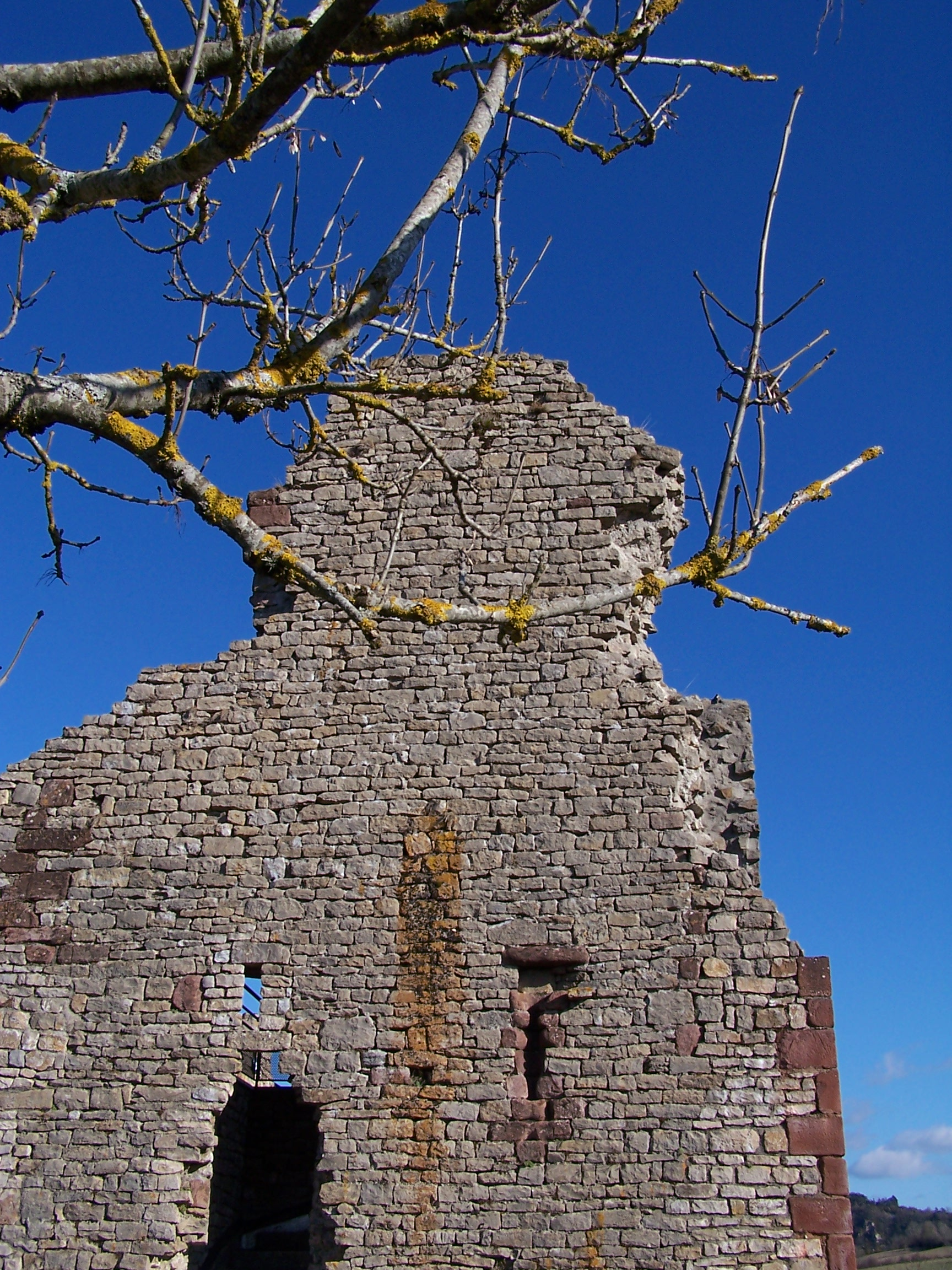 Photo des ruines du château de Canilhac. Canilhac est une commune de Lozère (48) France, proche de Banassac et La Canourgue